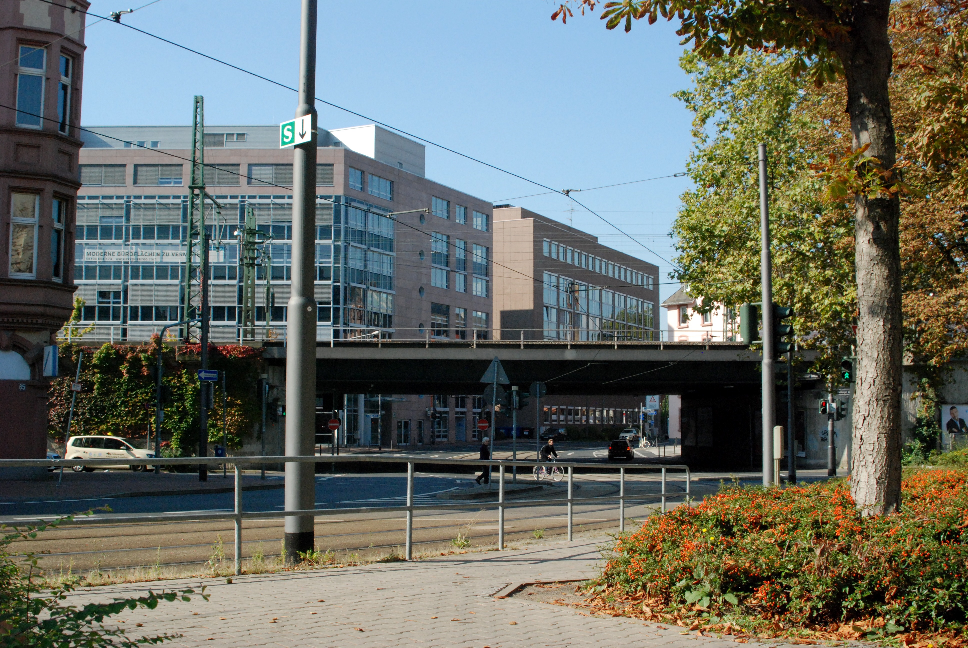 Frankfurt-Bockenheim, Standort Hamburger Allee, Viadukt, Blick in Voltastraße auf den Gebäudekomplex der ehemaligen Firma CompuNet des Gründers Jost Stollmann (*1955) in der Voltastra0e 1 / Kreuznacher Straße 30. Nachbargebäude Voltastraße 1a, geplant als Nixdorf-Computerschulungscenter.